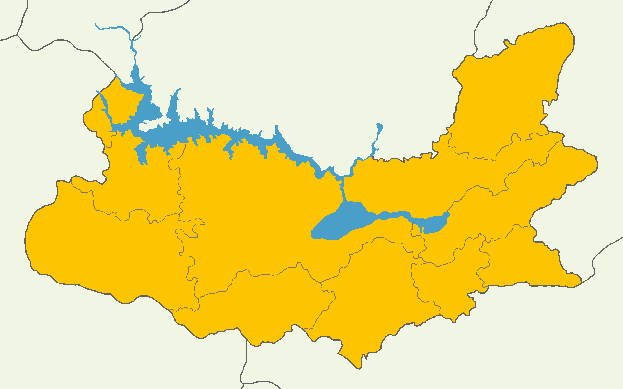 Elazığ'da 2014 Türkiye cumhurbaşkanlığı seçimi sonuçları